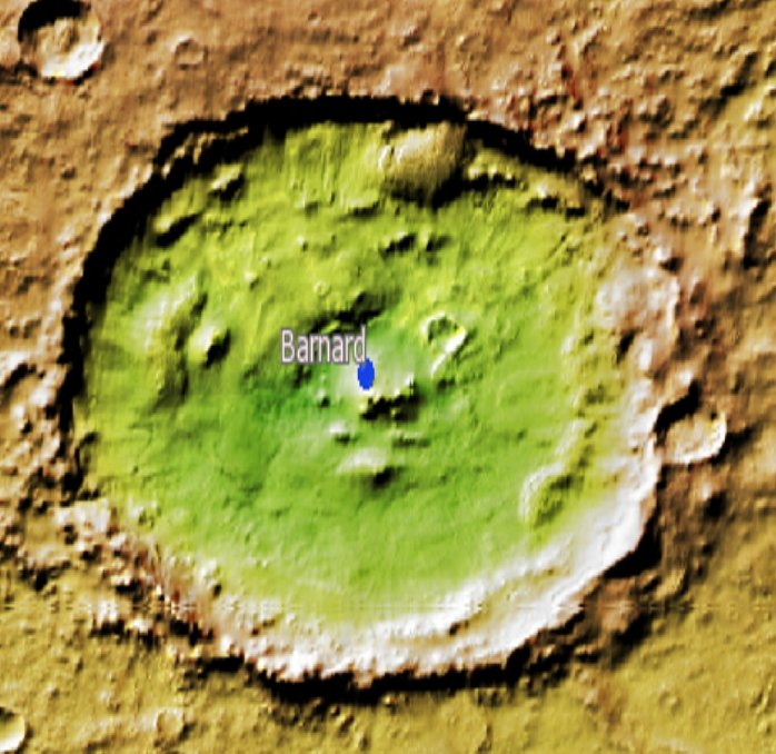 Cráter marciano Barnard. (Imagen IAU/USGS/Goddard/A SU/USGS)